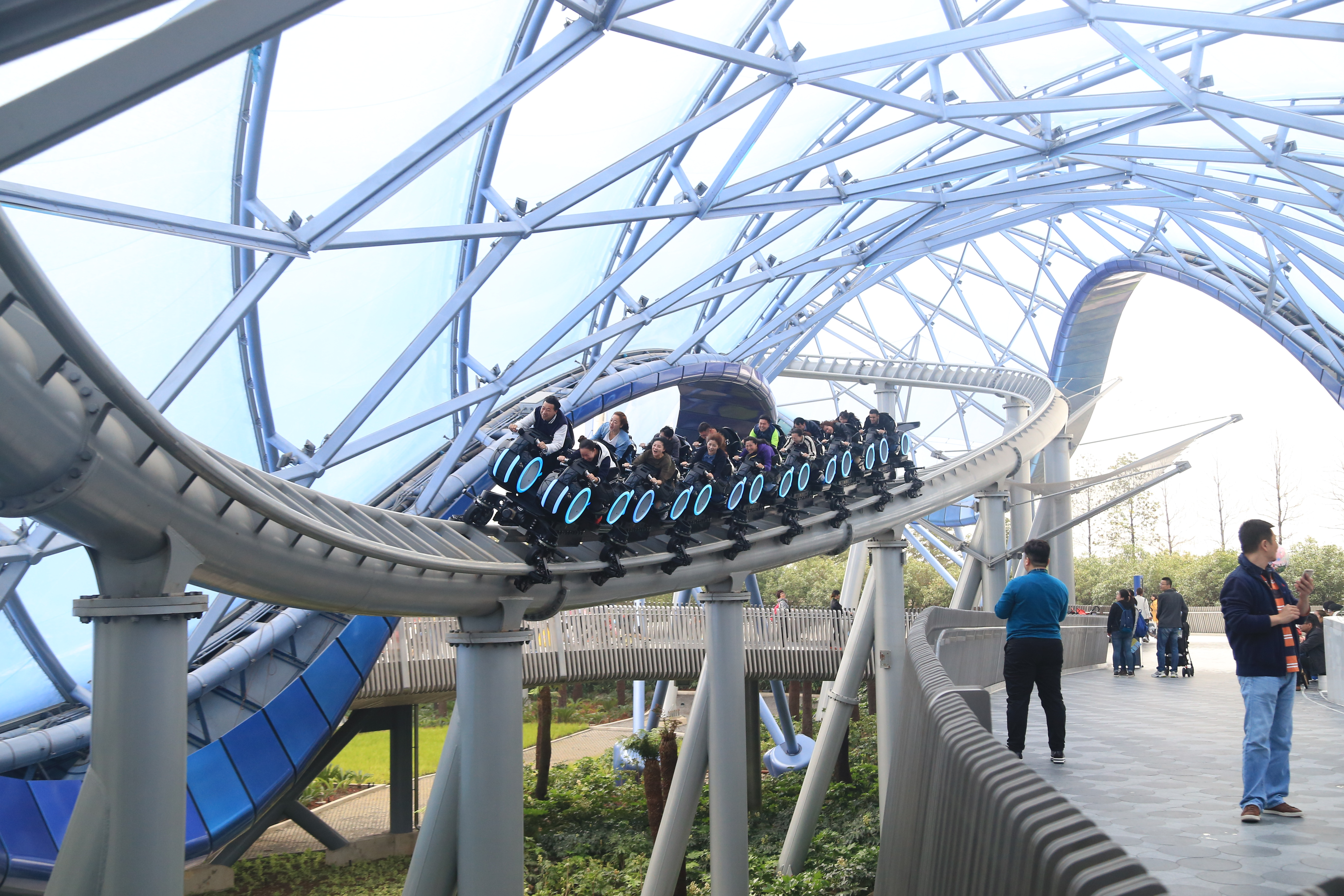 创极速光轮过山车运行中